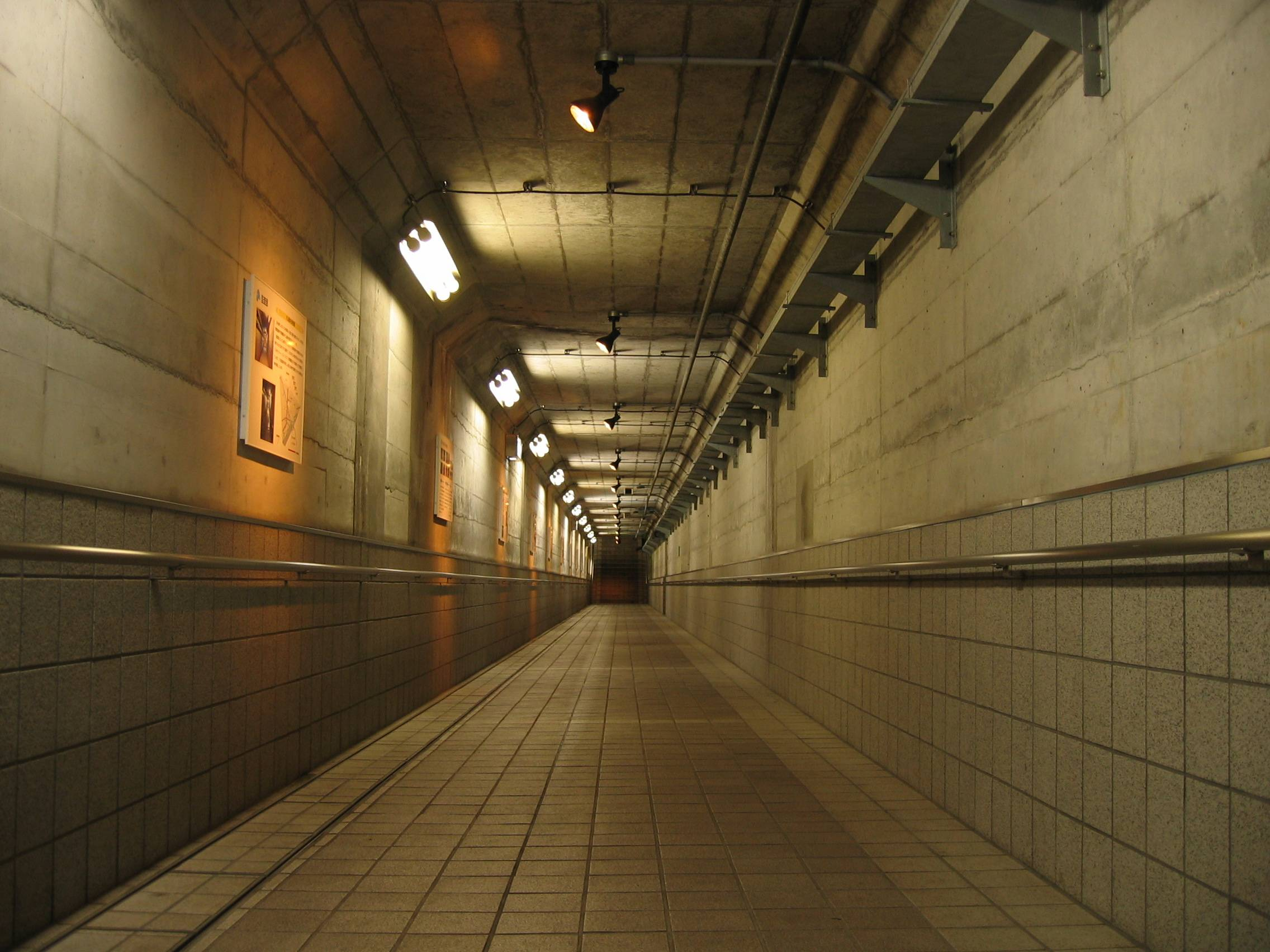 Miyagase Dam (宮ヶ瀬ダム) inner passage.